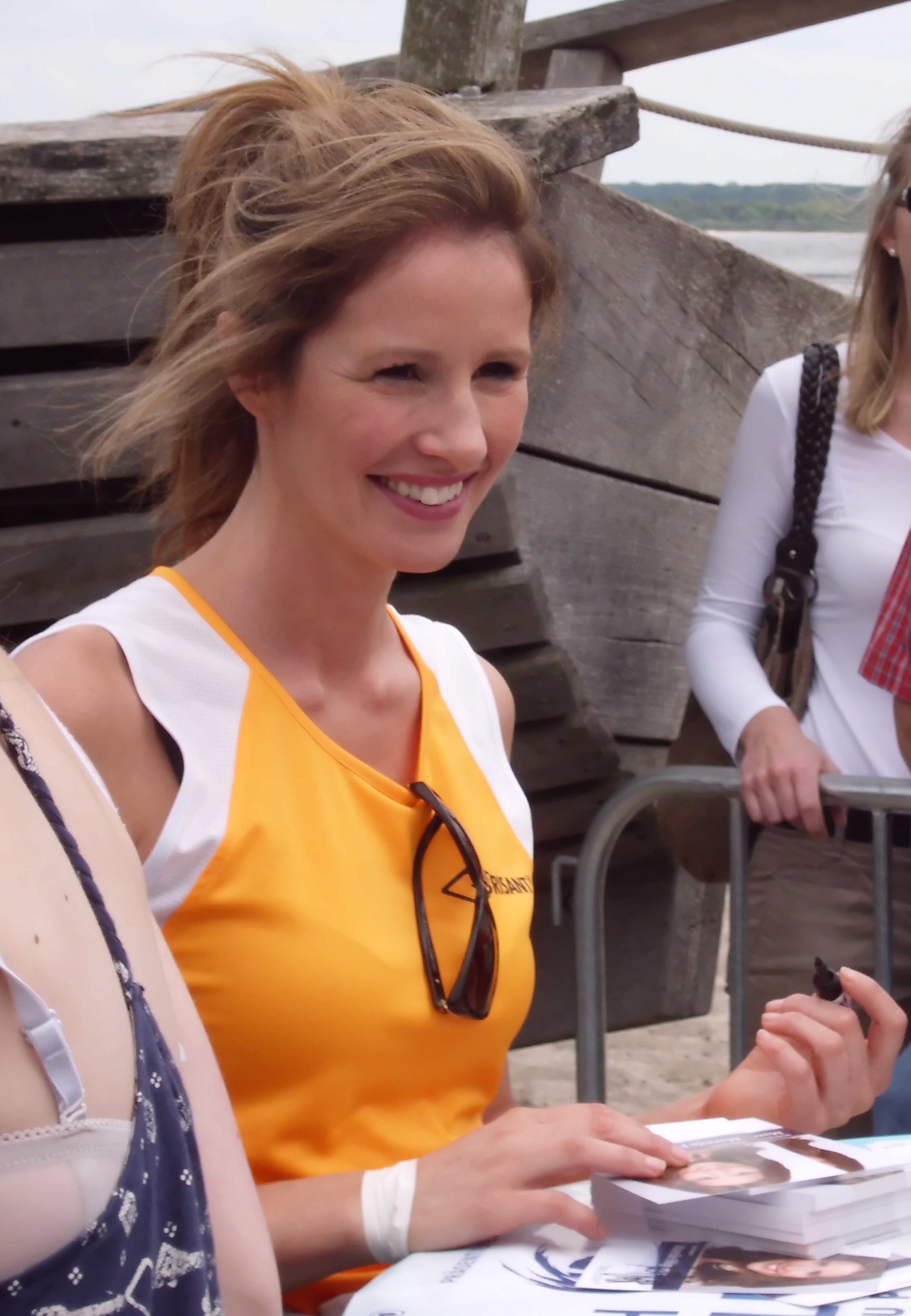 Mareile Höppner bei der Autogrammstunde, Beachvolleyball-Starcup 2013